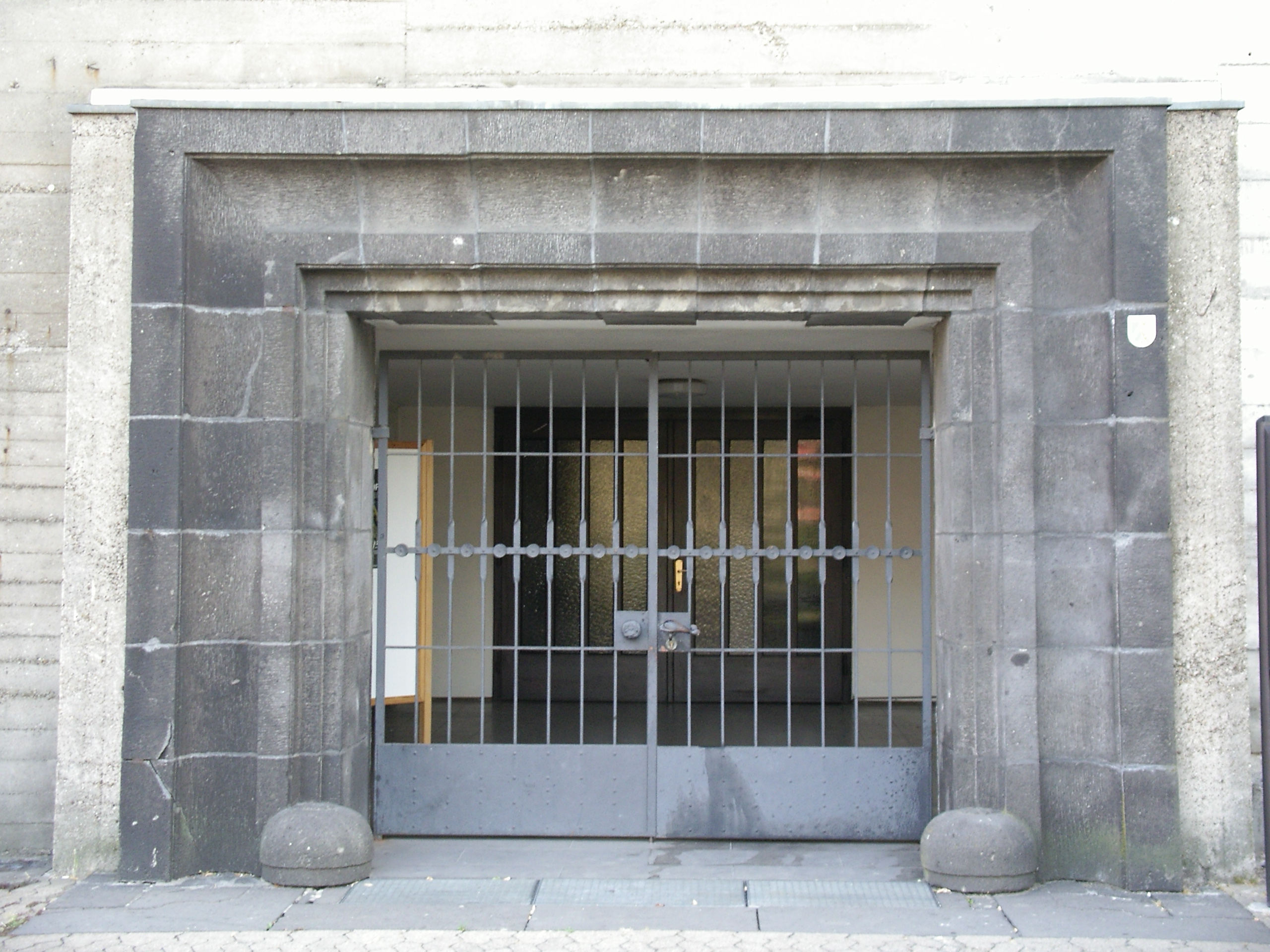 Düsseldorf-Heerdt - Bunkerkirche am Handweiser - Eingang